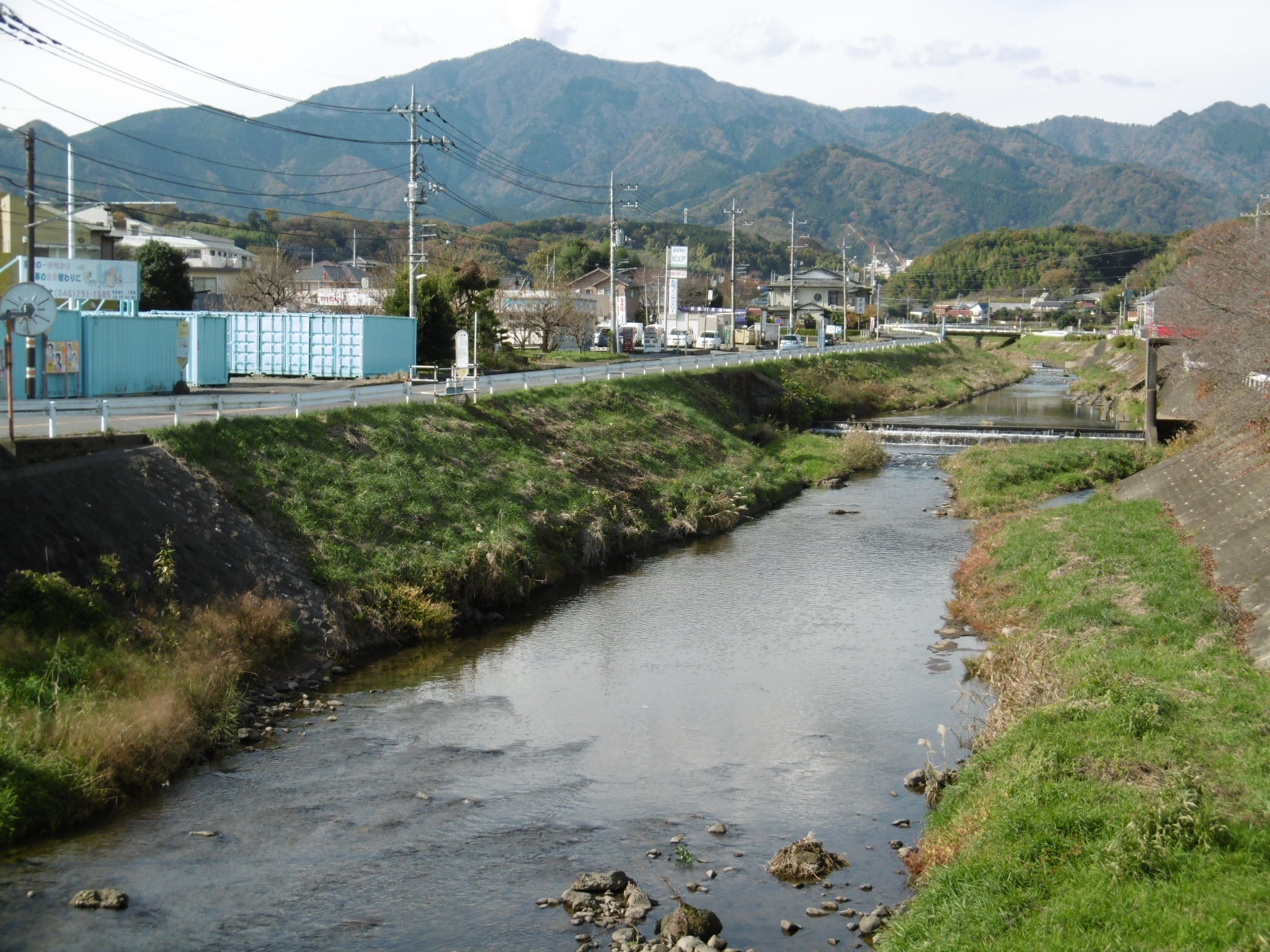 神奈川県厚木市内に流れる玉川(相模川水系)。奥に見える大山方面から流れてくる。